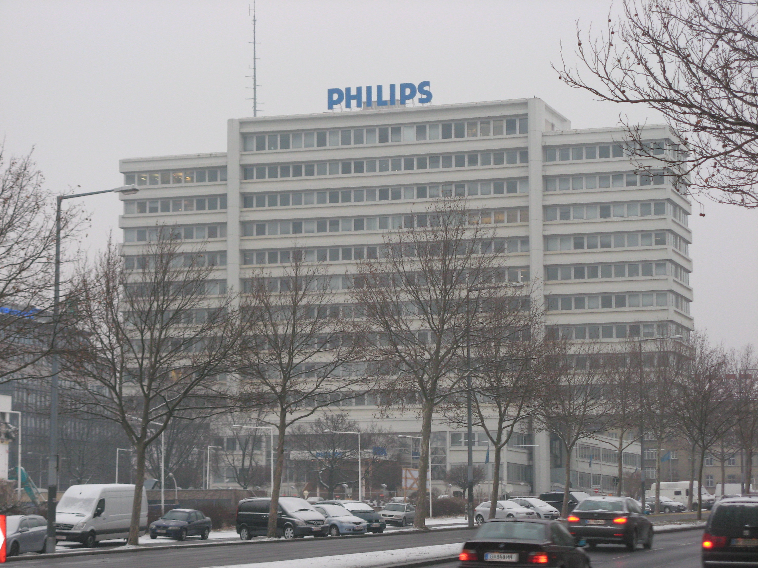 Philips-Haus (1962-70) von Karl Schwanzer, Triester Straße 64-66, Wien-Favoriten (More images, commons, de)